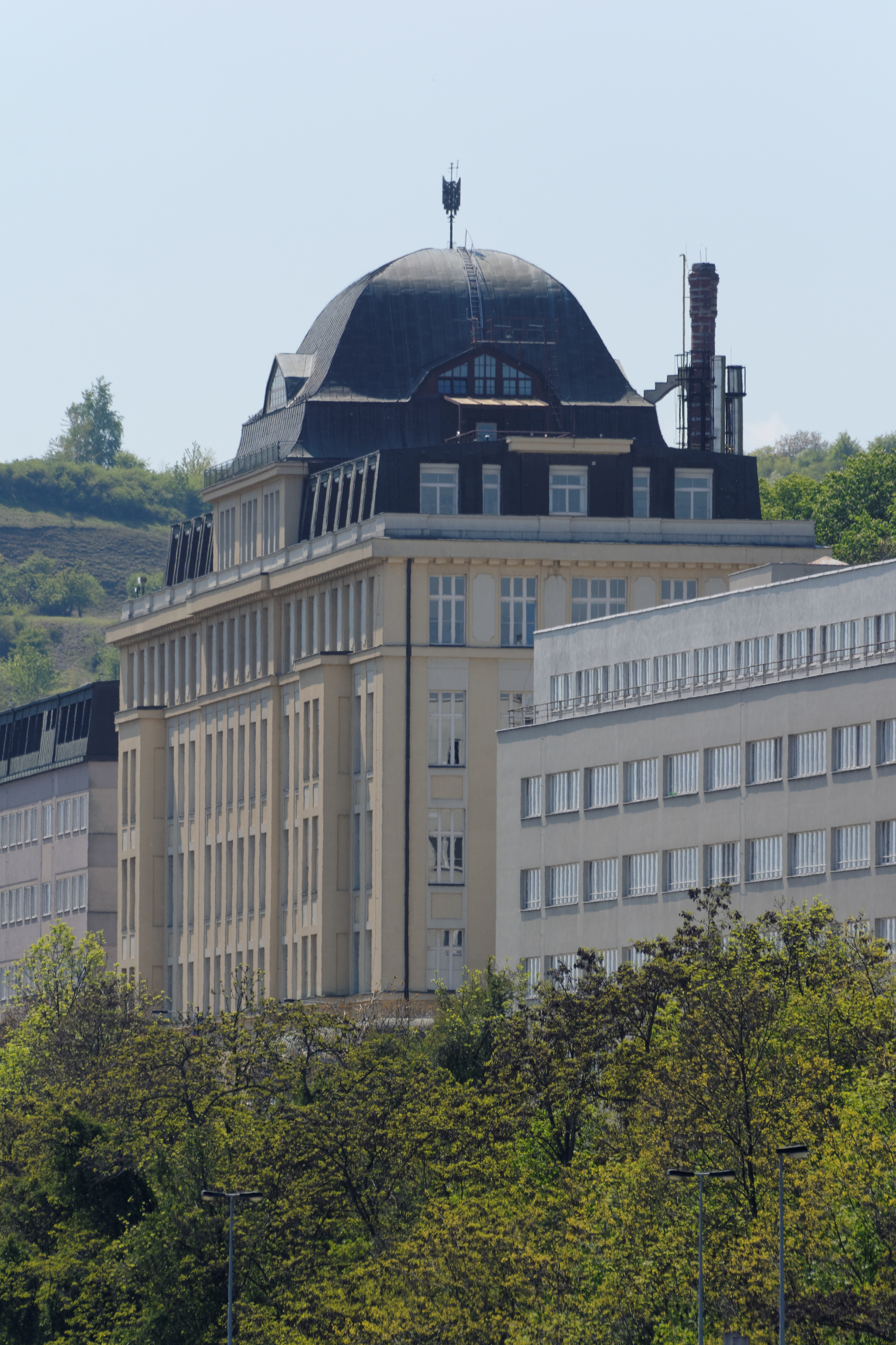 Česká správa sociálního zabezpečení, Křížová 2383/27, Smíchov.